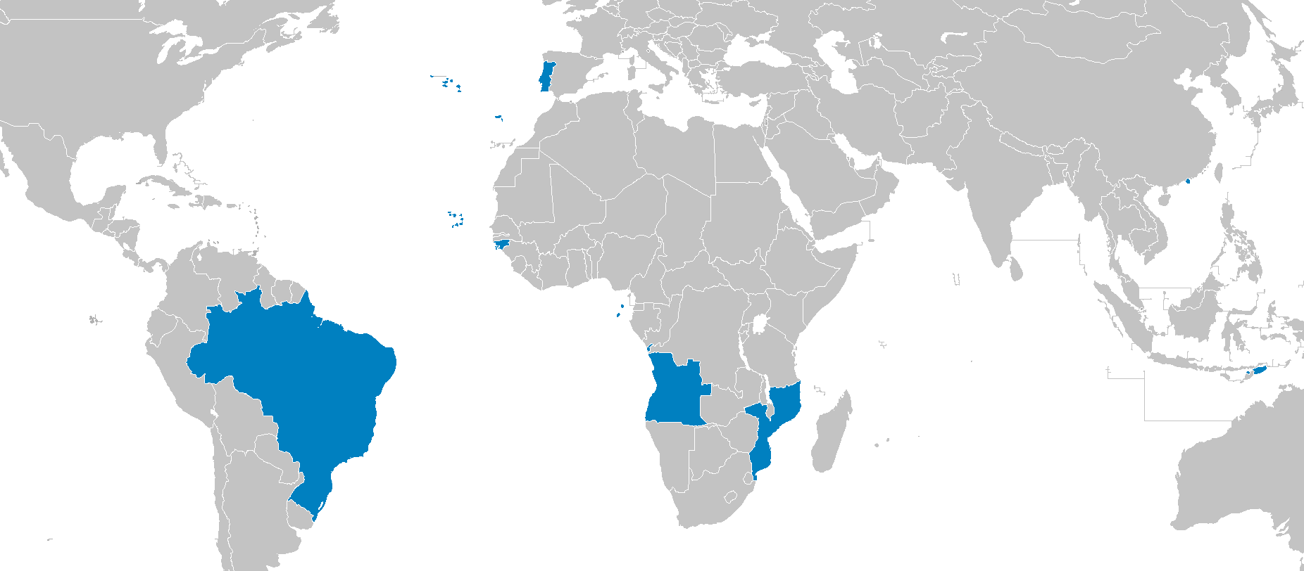 Idioma portugués